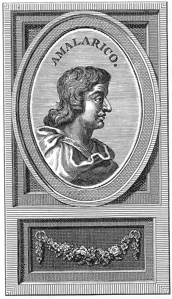 Rey visigodo de Hispania. Retrato de Amalarico